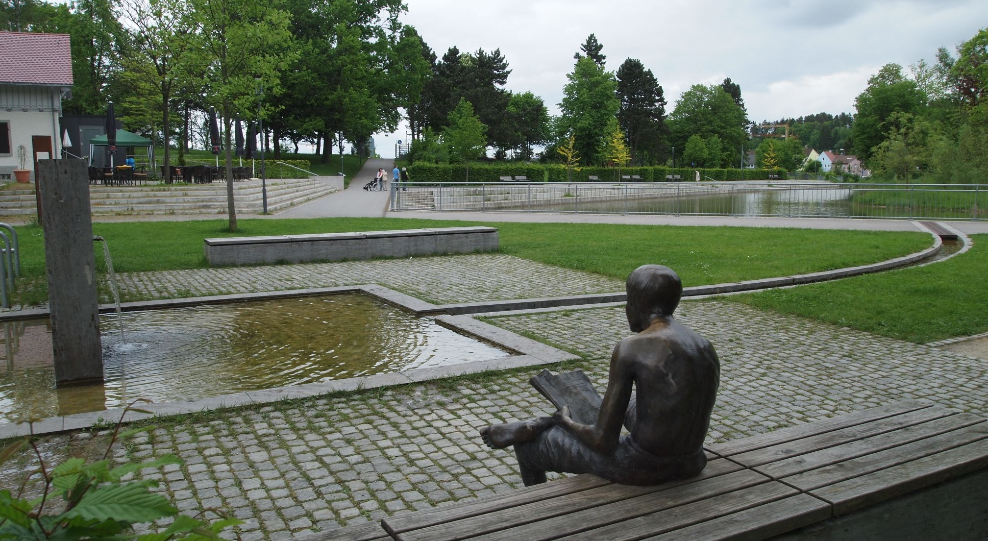 Skupltur Matze liest die Neckarquelle von Herbert Wurm im Stadtpark Möglingshöhe